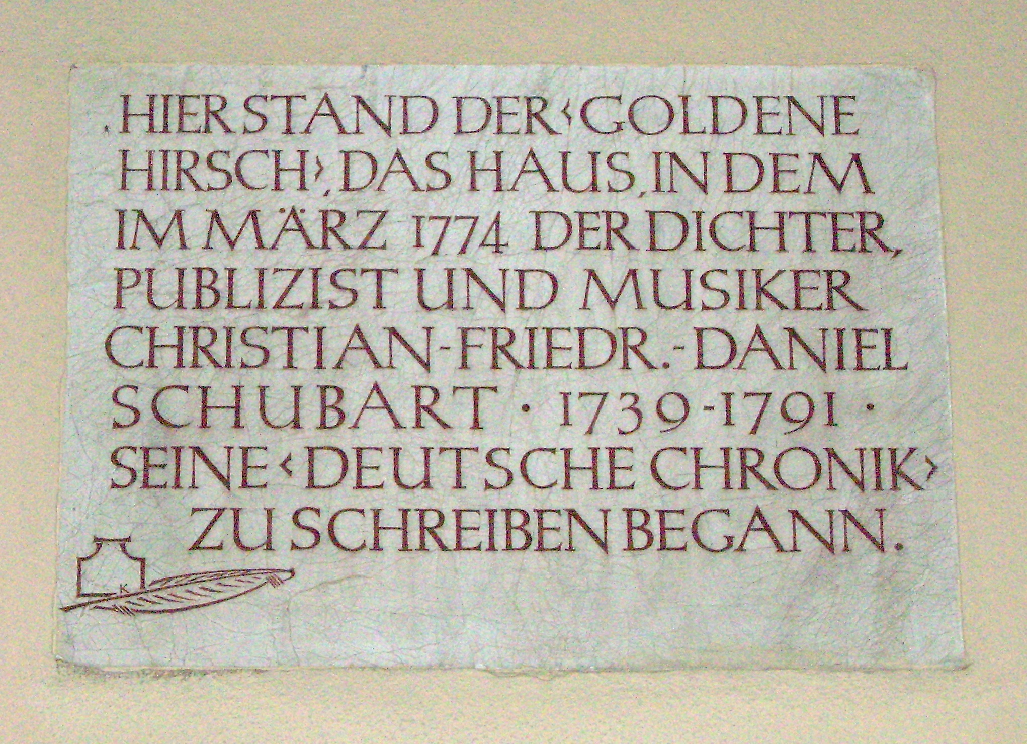 Schubart-Gedenktafel, Augsburg. Text: Hier stand der ‹Goldene Hirsch›, das Haus, in dem im März 1774 der Dichter, Publizist und Musiker Christian-Friedr.-Daniel Schubart • 1739—1791 • seine ‹Deutsche Chronik› zu schreiben begann.